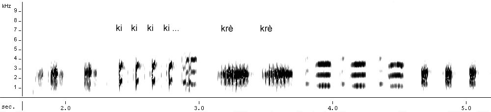 Chant de la Rousserolle turdoïde. Sonagramme d'un extrait d'une phrase. Sur l'échelle horizontale : le temps en secondes (sec.), sur l'échelle verticale : la fréquence en kilohertz (kHz). Le chant de cette Rousserolle a été enregistré vers 1975 dans une roselière des marais de la Macta (Algérie). Ce chant très fort s'entend de loin. Rauque et émis sur un tempo assez lent, il se présente comme une succesion de motifs répétés caractéristiques : karré-karré, krè-krè, etc ...